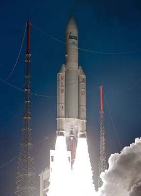 Azərbaycanın ilk peyki.